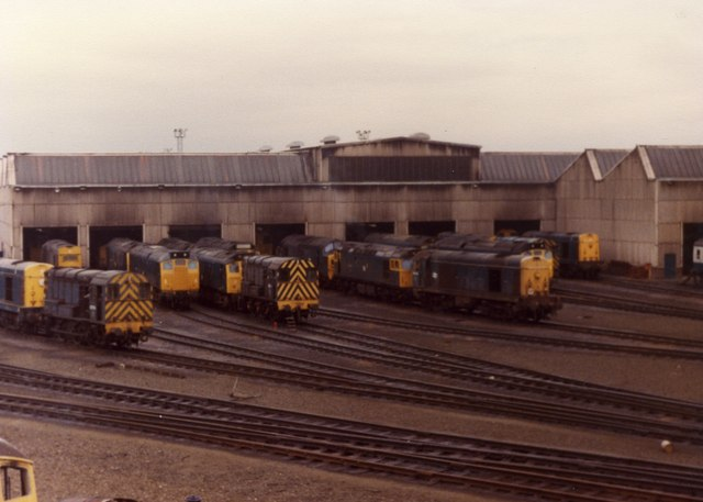 Eastfield Loco depot